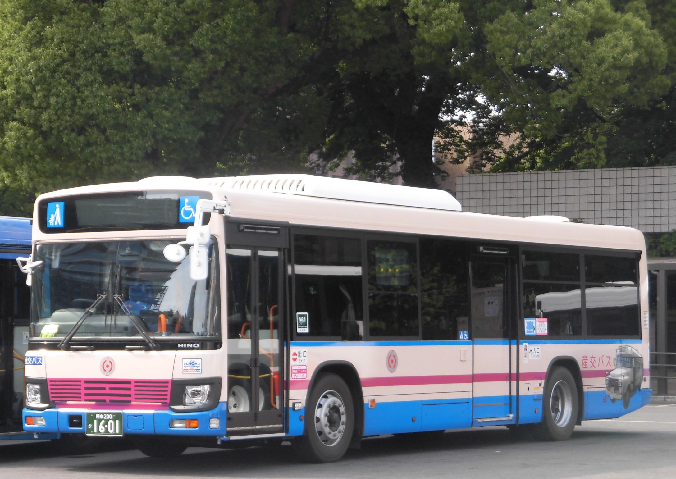 九州産交バス（復刻塗装）